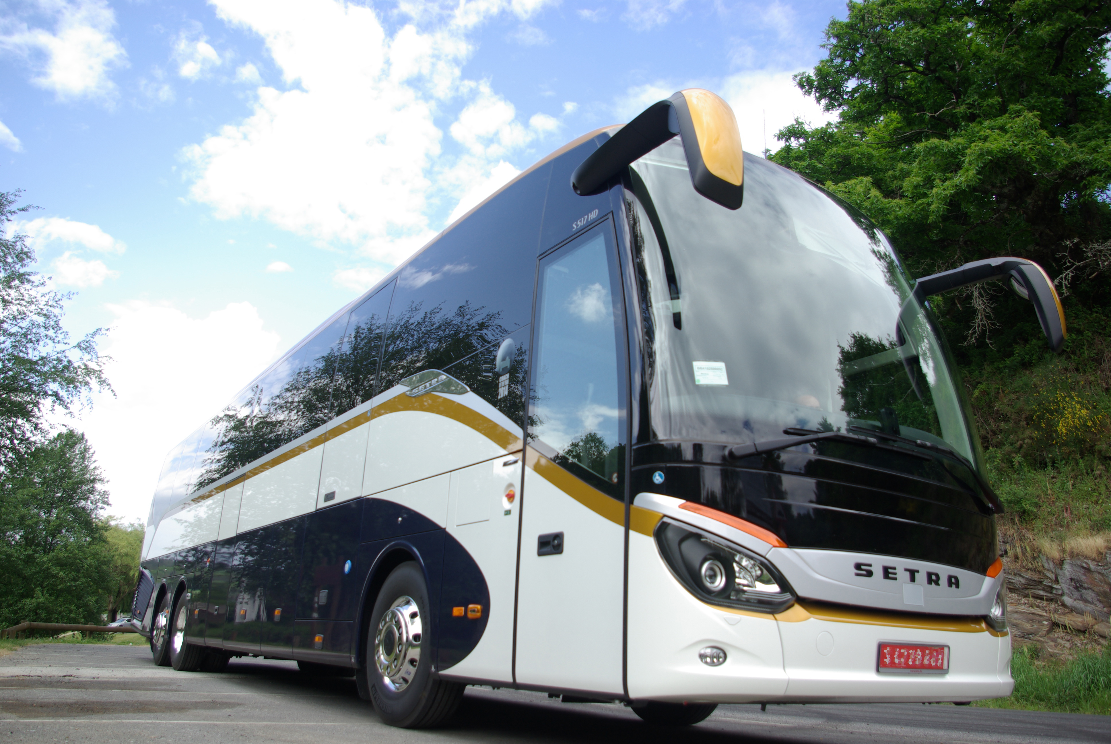 Autobús de Monbus